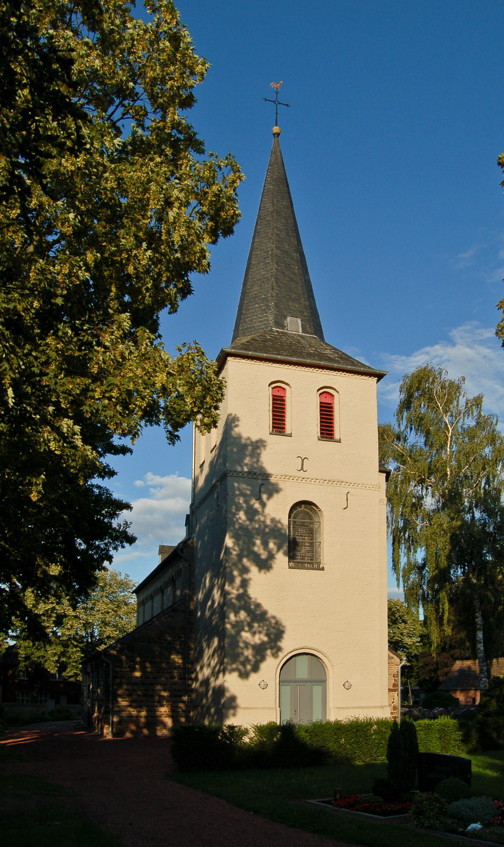 Kirchturm der katholischen Kirche in Wassenberg, Stadtteil Ophoven